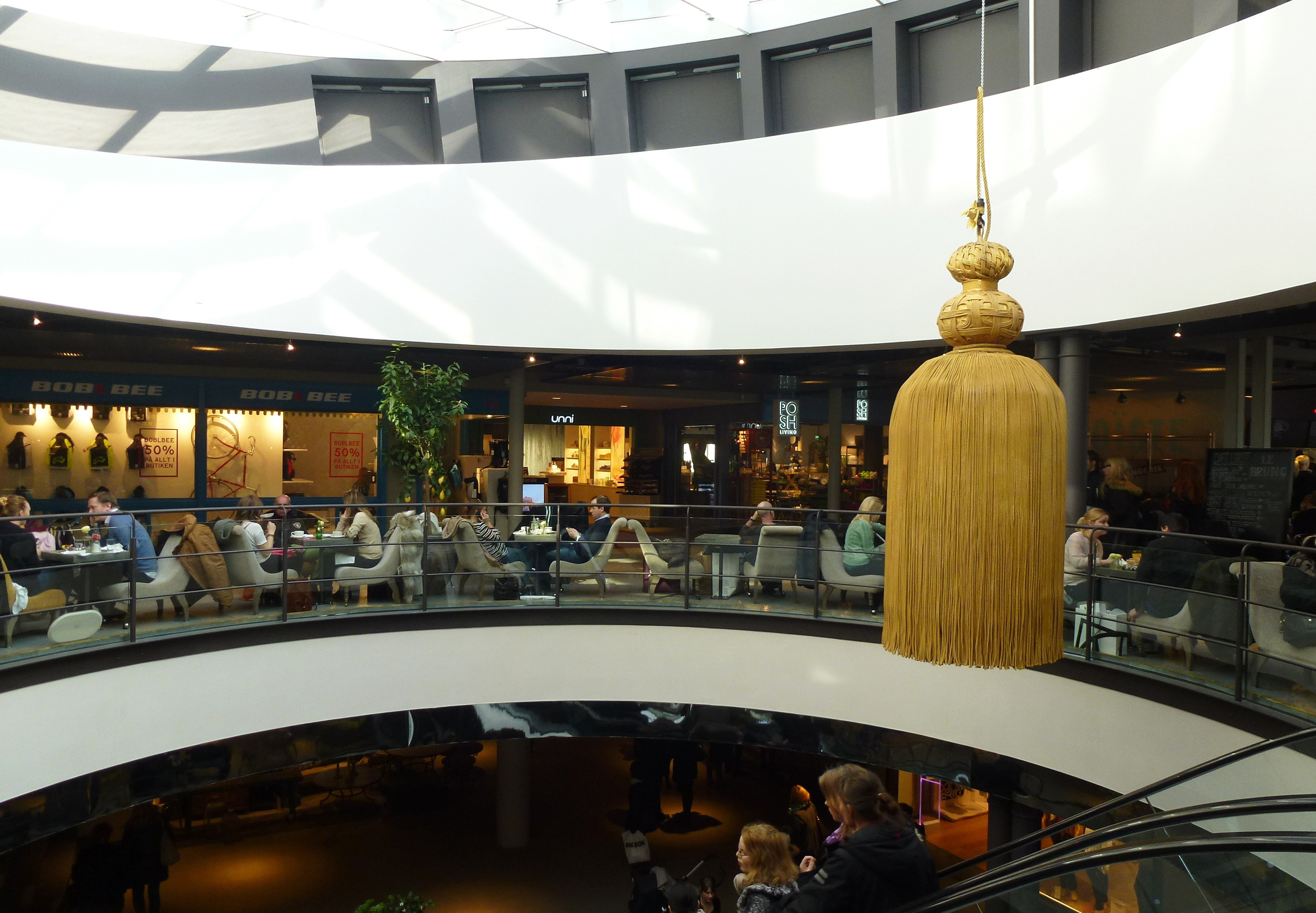 Mood Gallerian Stockholm